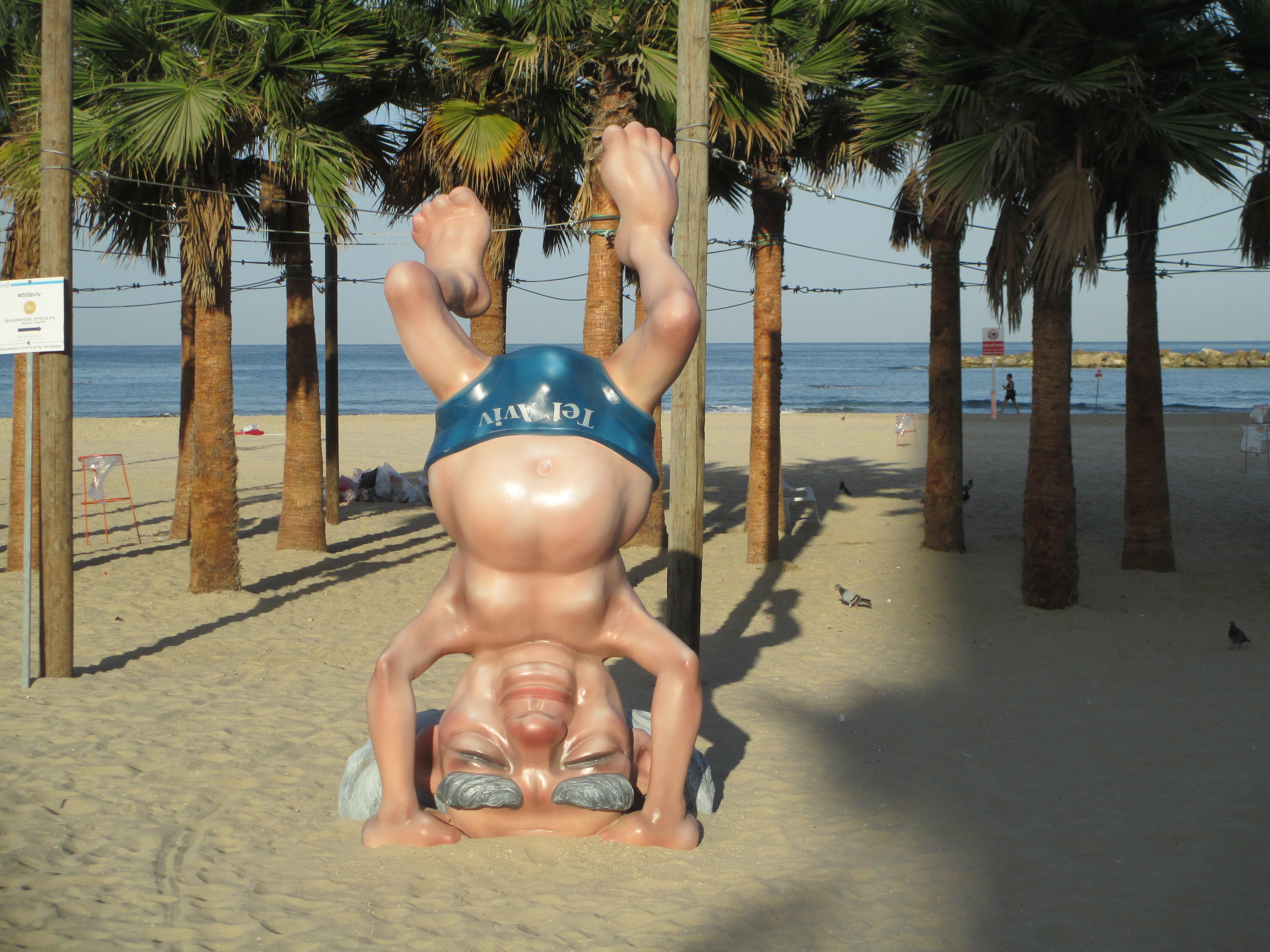 פסל דוד בן גוריון עומד על הראש בחוף תל אביב